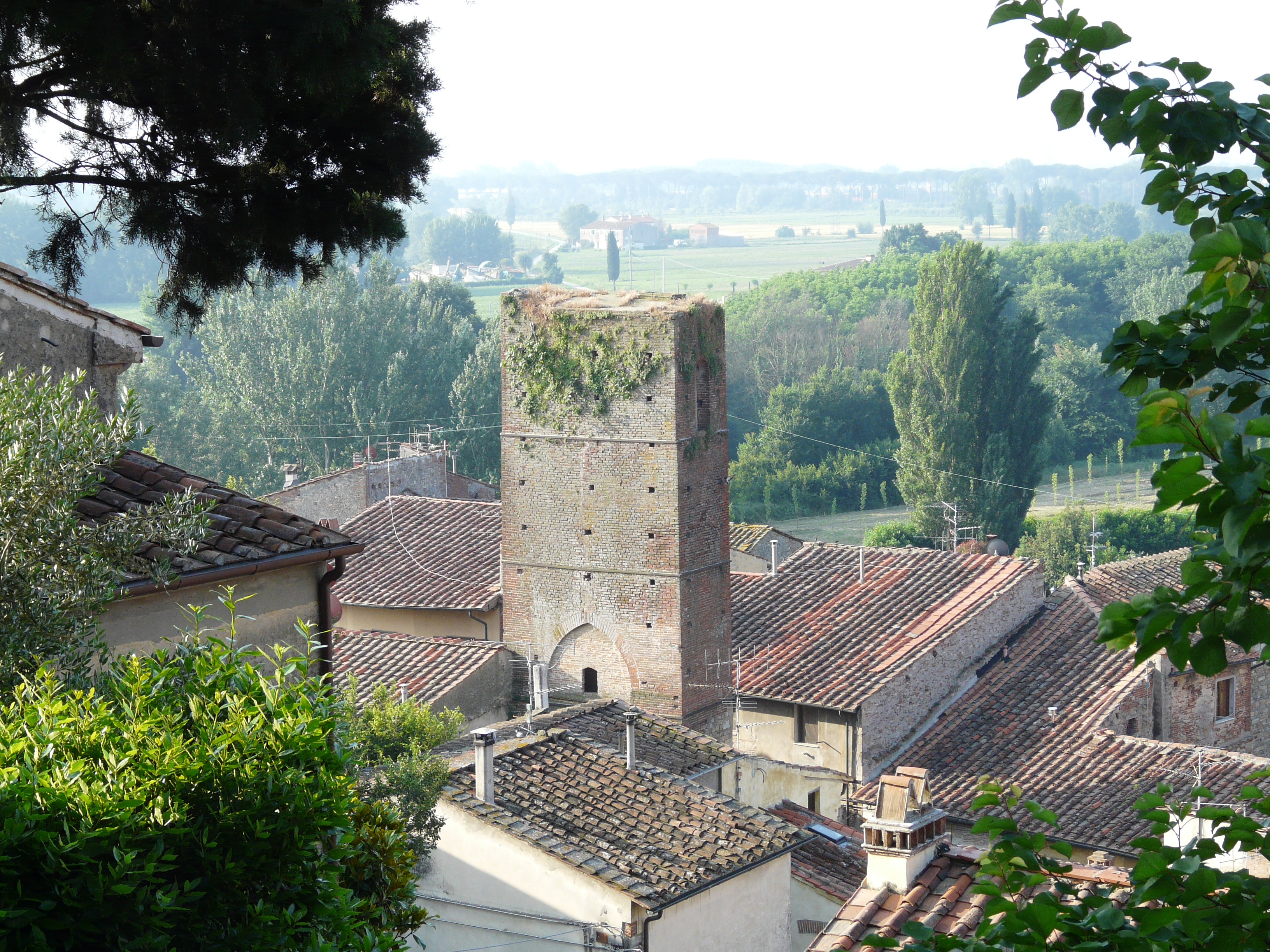 Torre Malanima, Comune di Vicopisano, Toscana, Italia